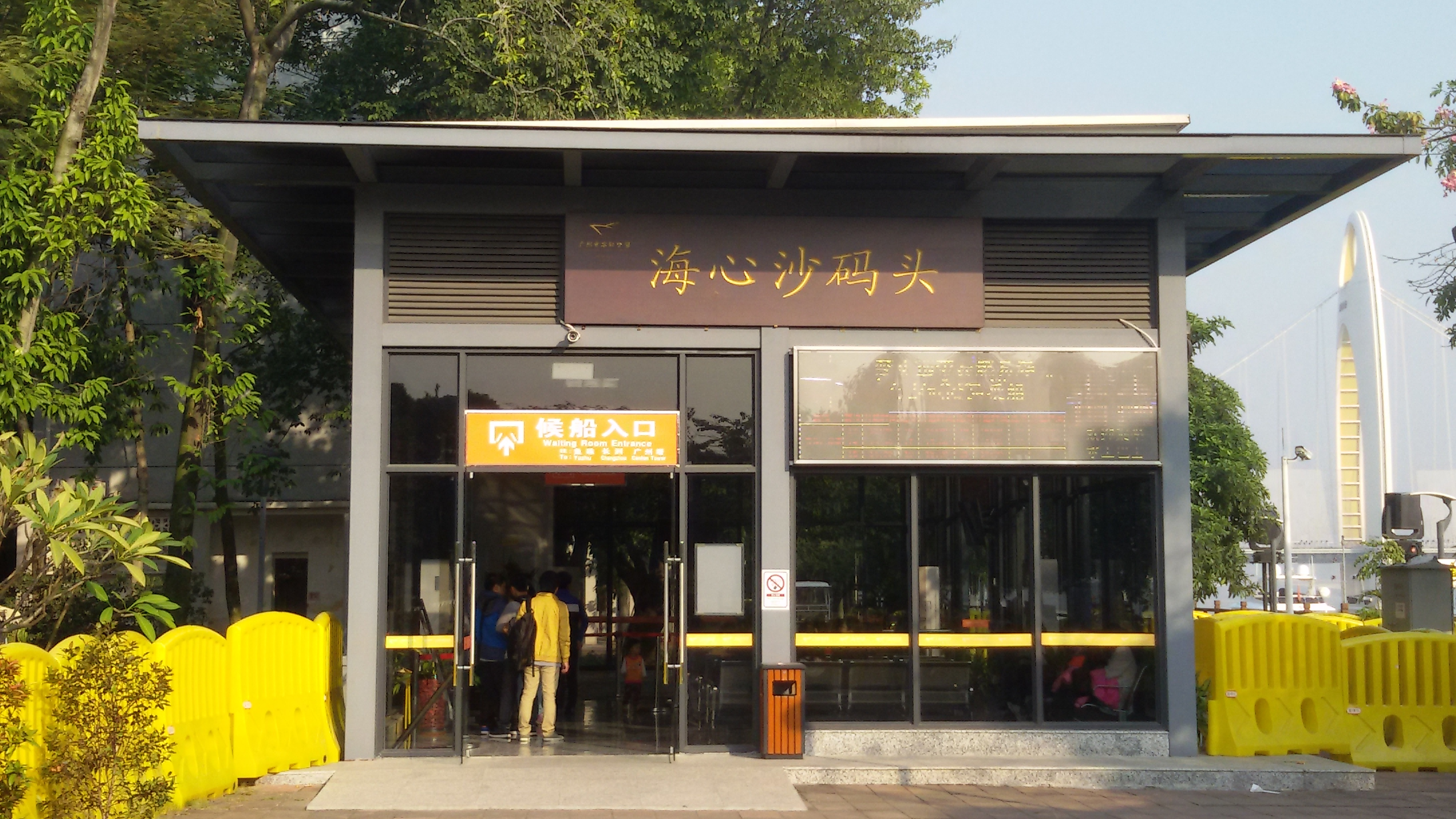 粵語: 海心沙碼頭